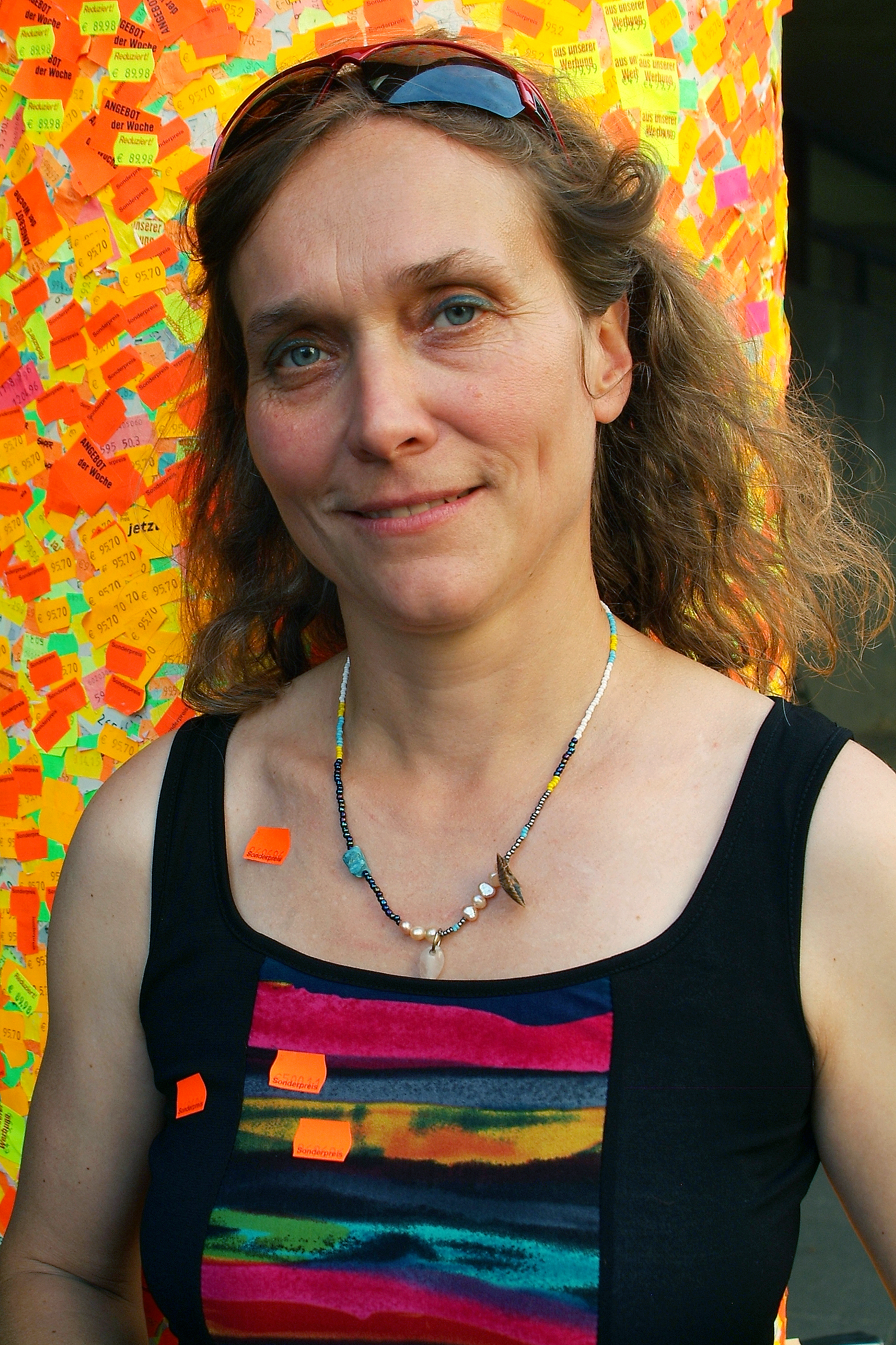 Die Künstlerin Dagmar Schmidt vor einer mit Preisetiketten beklebten Säule vor dem Historischen Museum Hannover anläßlich der Eröffnung der Ausstellung Strich-Code ...